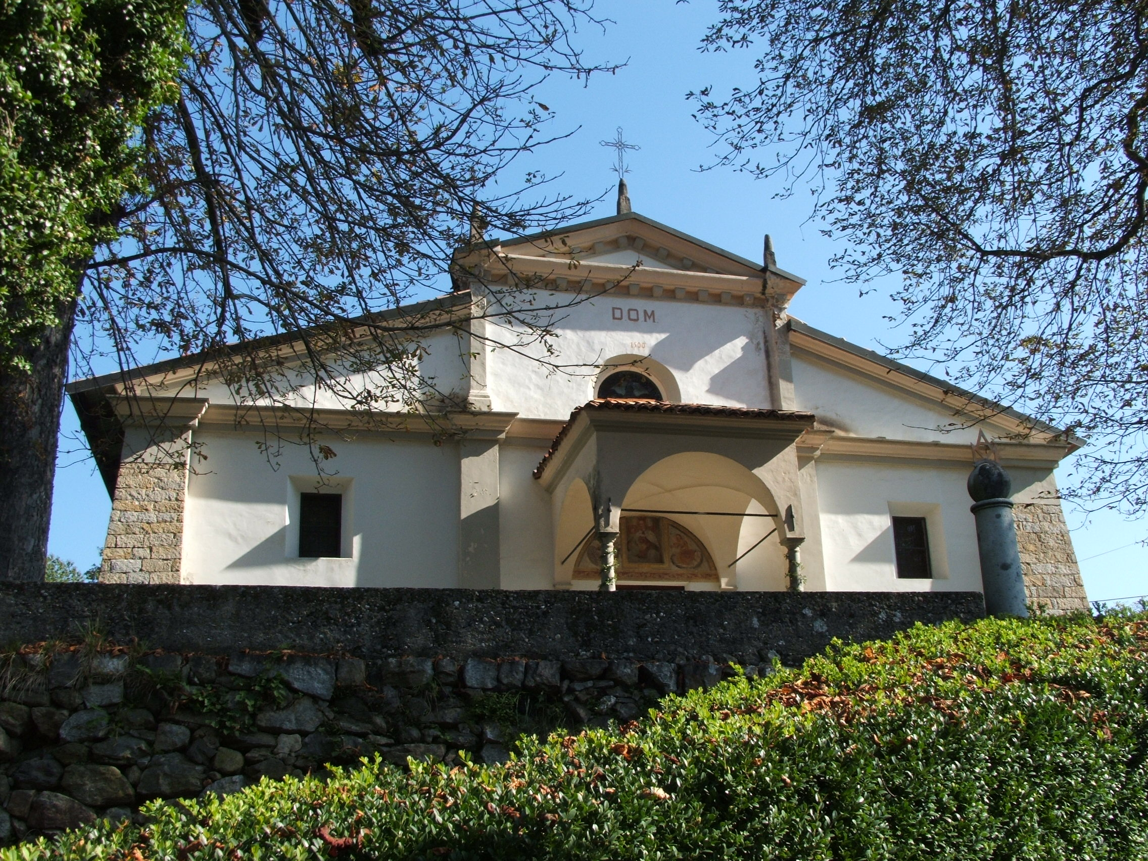 Santuario di Banchette a Bioglio (provincia di Biella, Piemonte, Italia) 1